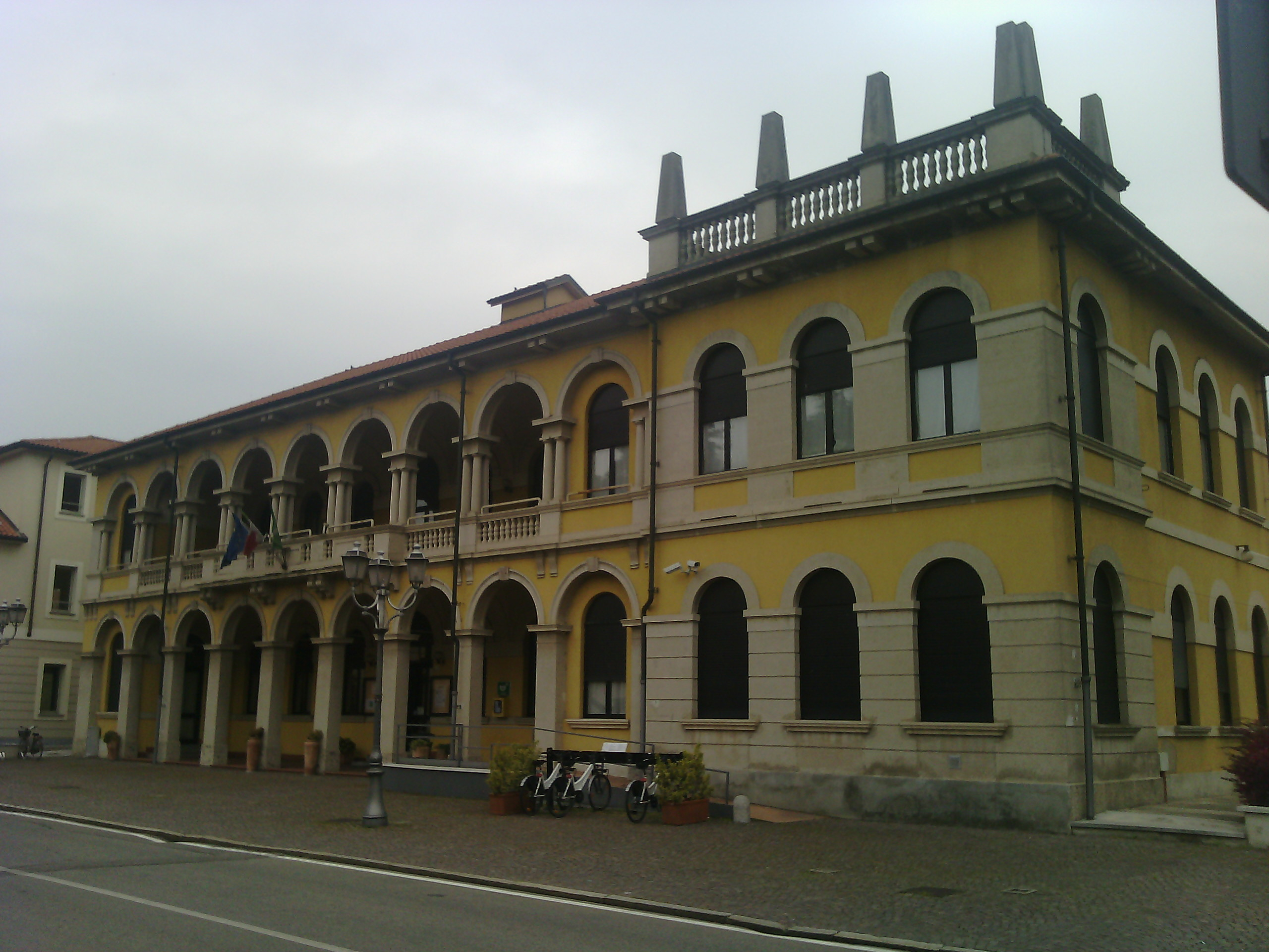 Palazzo Citterio a Santo Stefano Ticino (MI), Italy